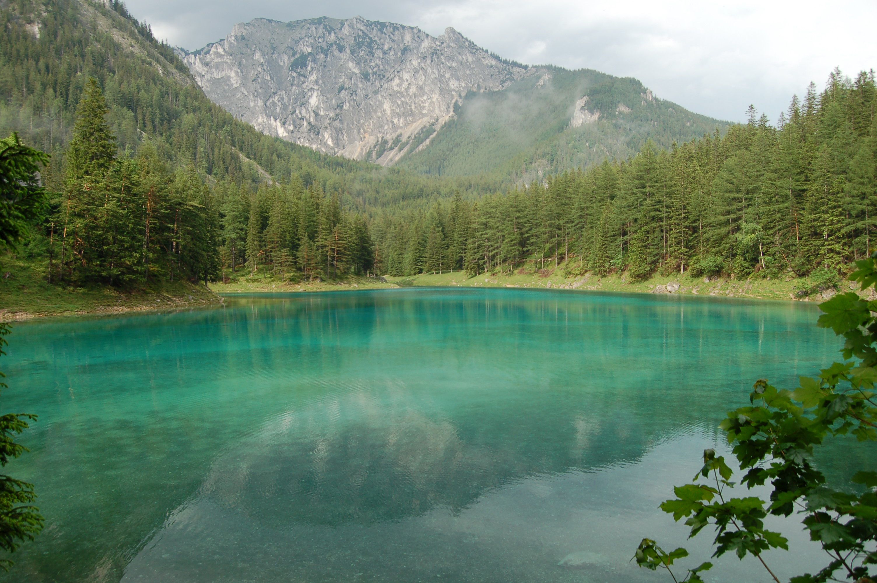 Grüner See in Tragöß gegen Meßnerin, Steiermark